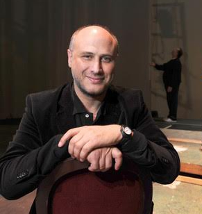 Paolo Miccichè in palcoscenico